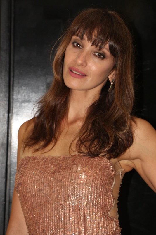 Sabrina Parlatore-021